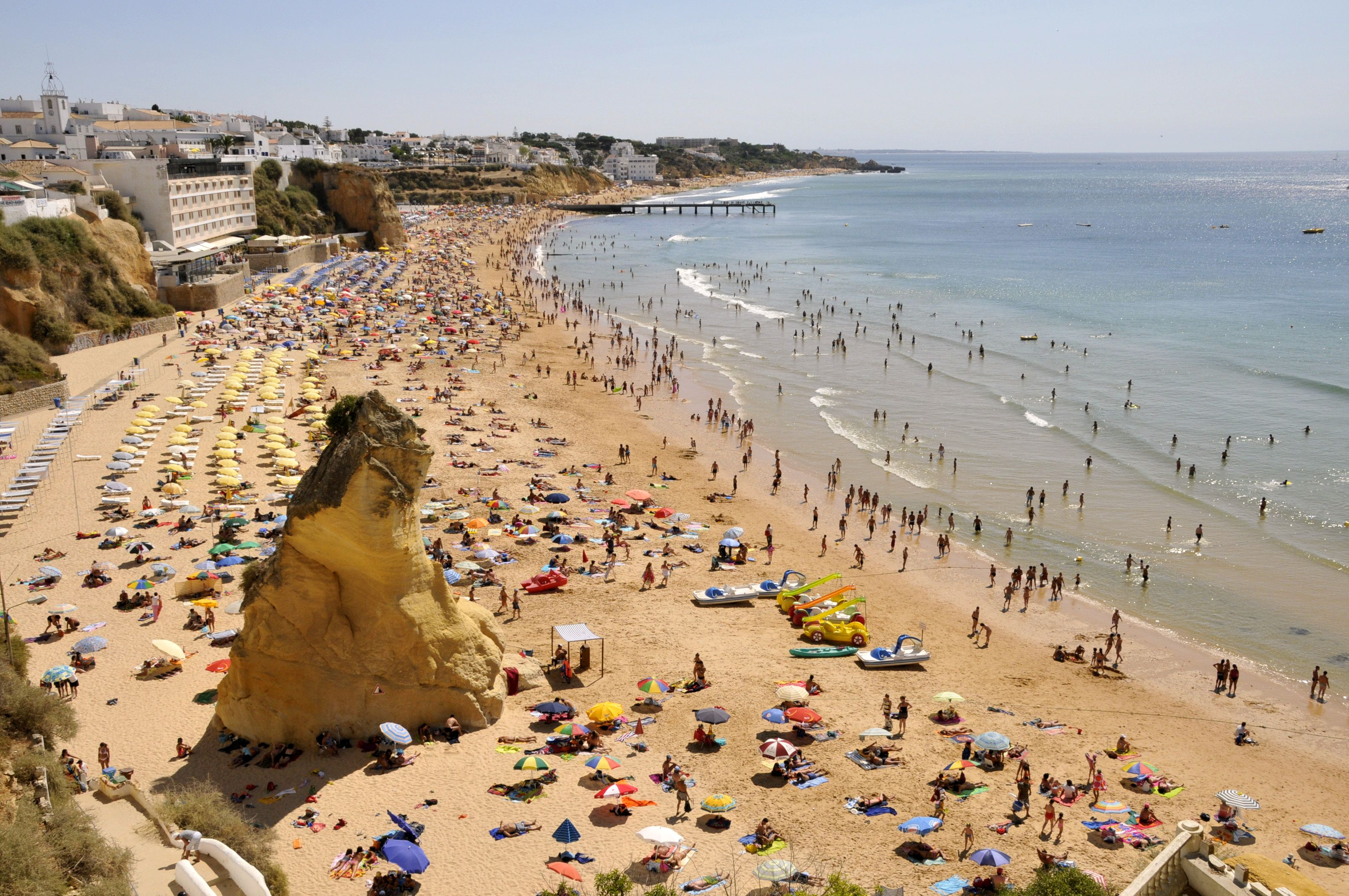 Strand bei Albufeira Same view in April